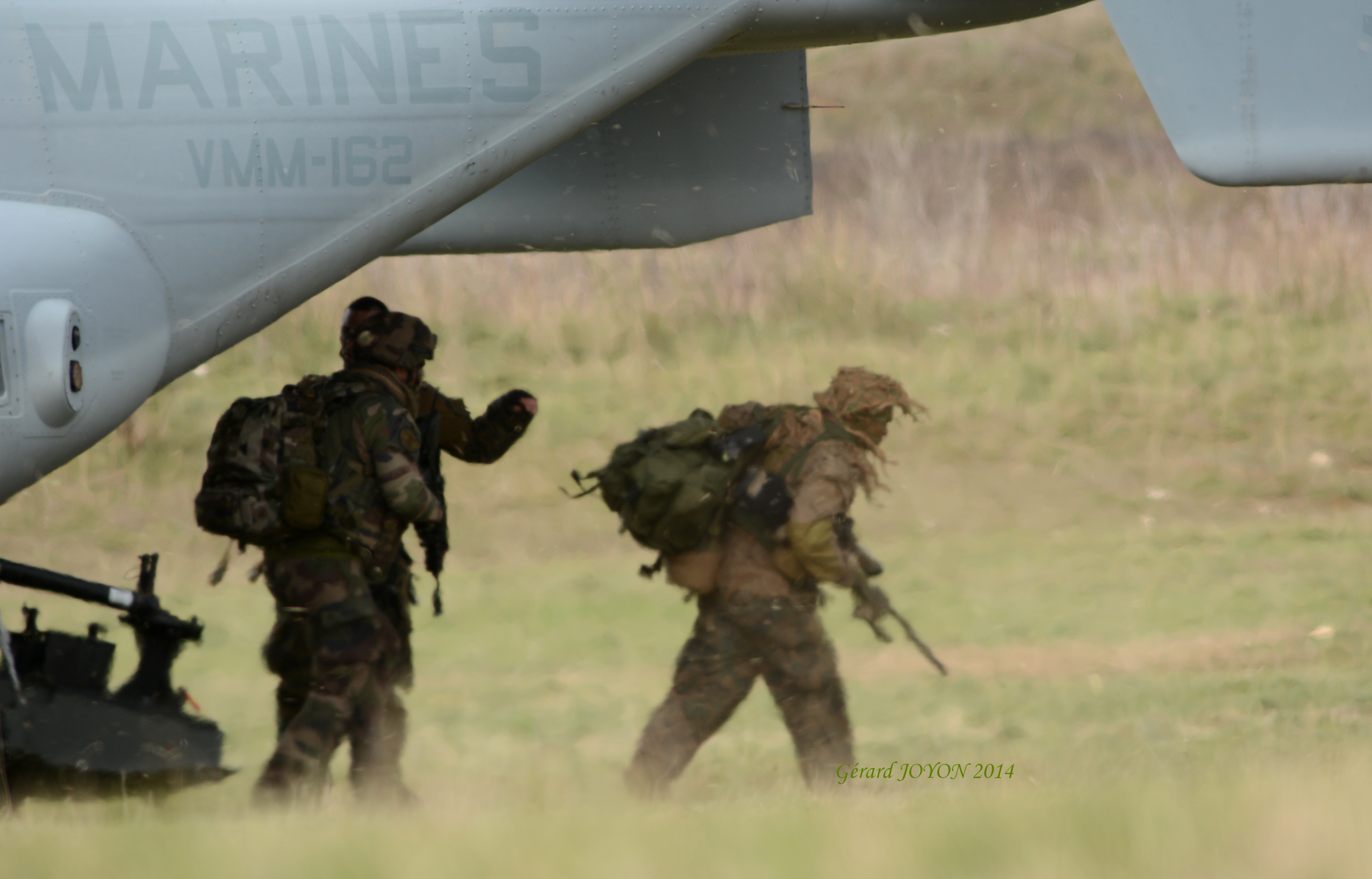 Marines et Marsouins lors d'un entraînement en février 2014 sortant d'un MV-22 Osprey. Camp des Garrigues Zone FONTFROIDE.